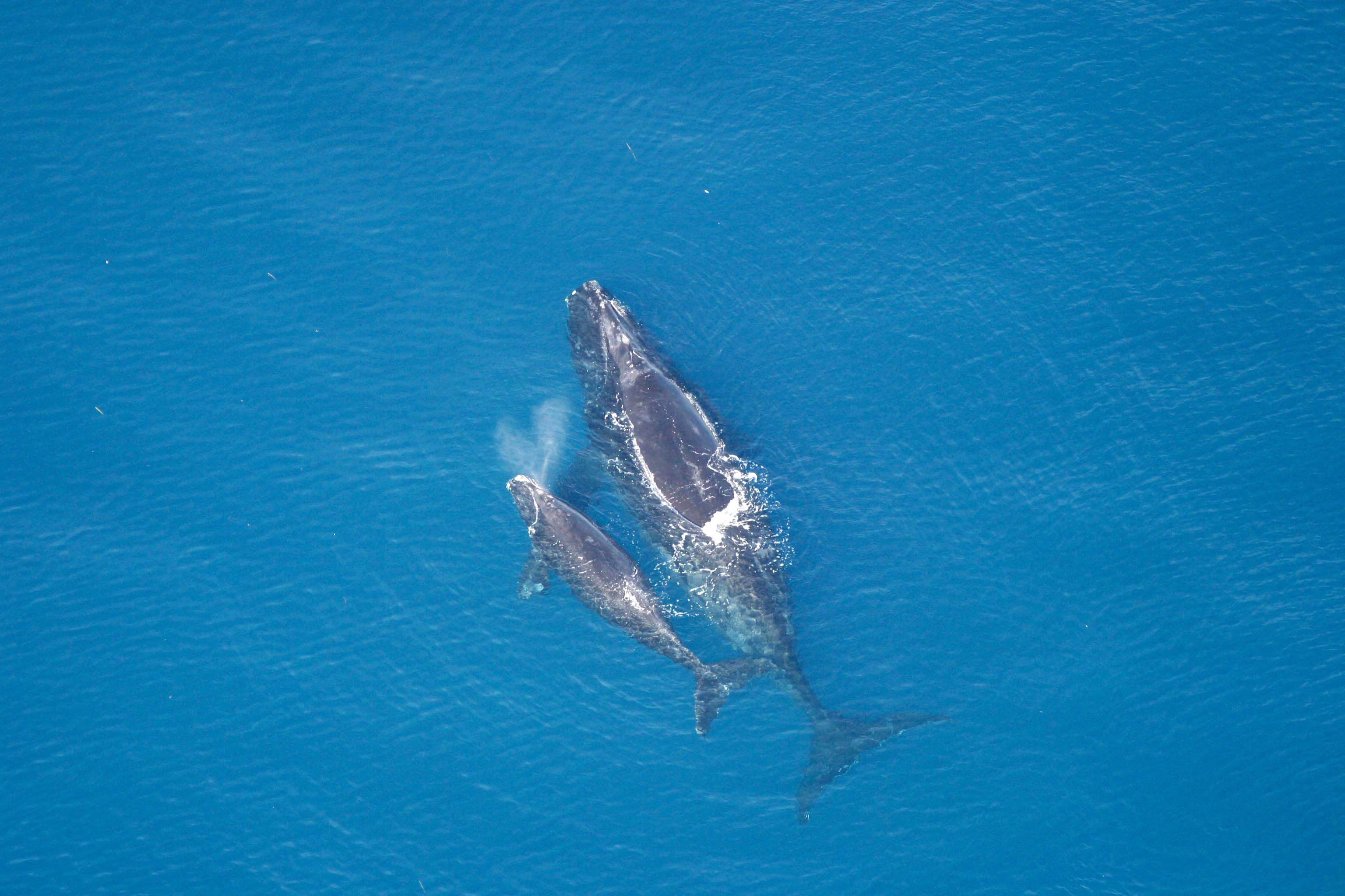 anim1751